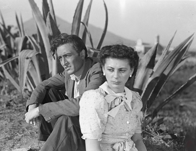 Foto di scena del film "Malaspina" con Vera Rol e Aldo Bufi Landi